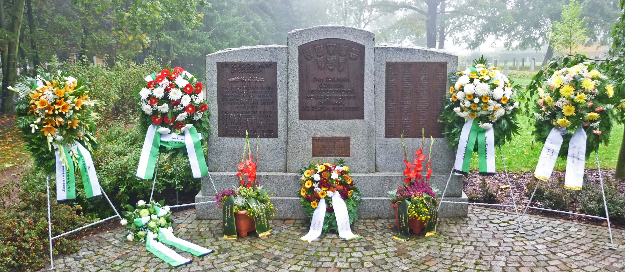 Denkmal auf dem Flüchtlings- und Vertriebenen-Friedhof in Freiberg (Sachsen) an der Himmelfahrtsgasse